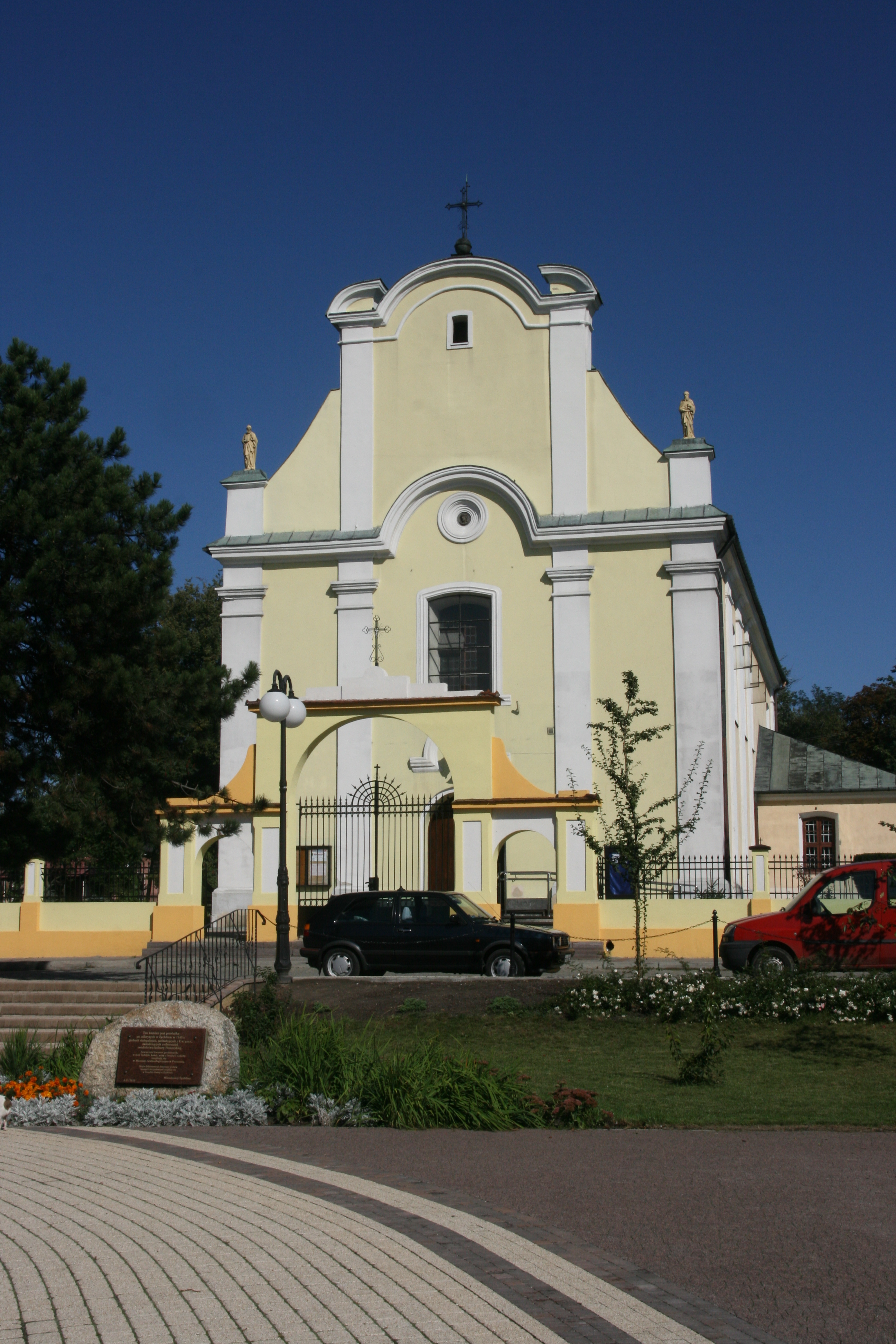 Żychlin - kościół parafialny pw. śś. Piotra i Pawła, mur., 1782 (zabytek nr 270/29 z 18.07.1967)